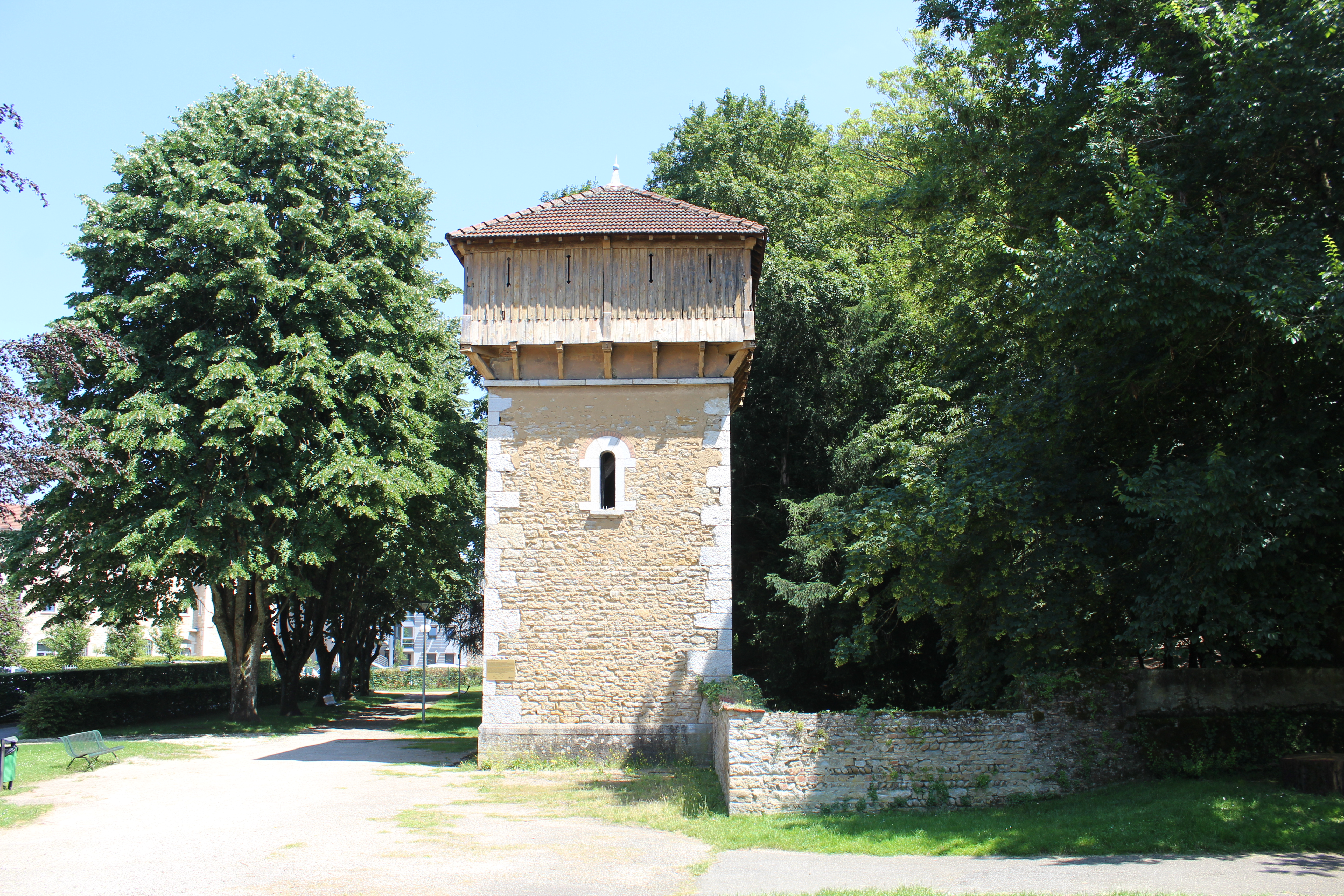 Tour dans le Parc de la Visitation à Bourg-en-Bresse.